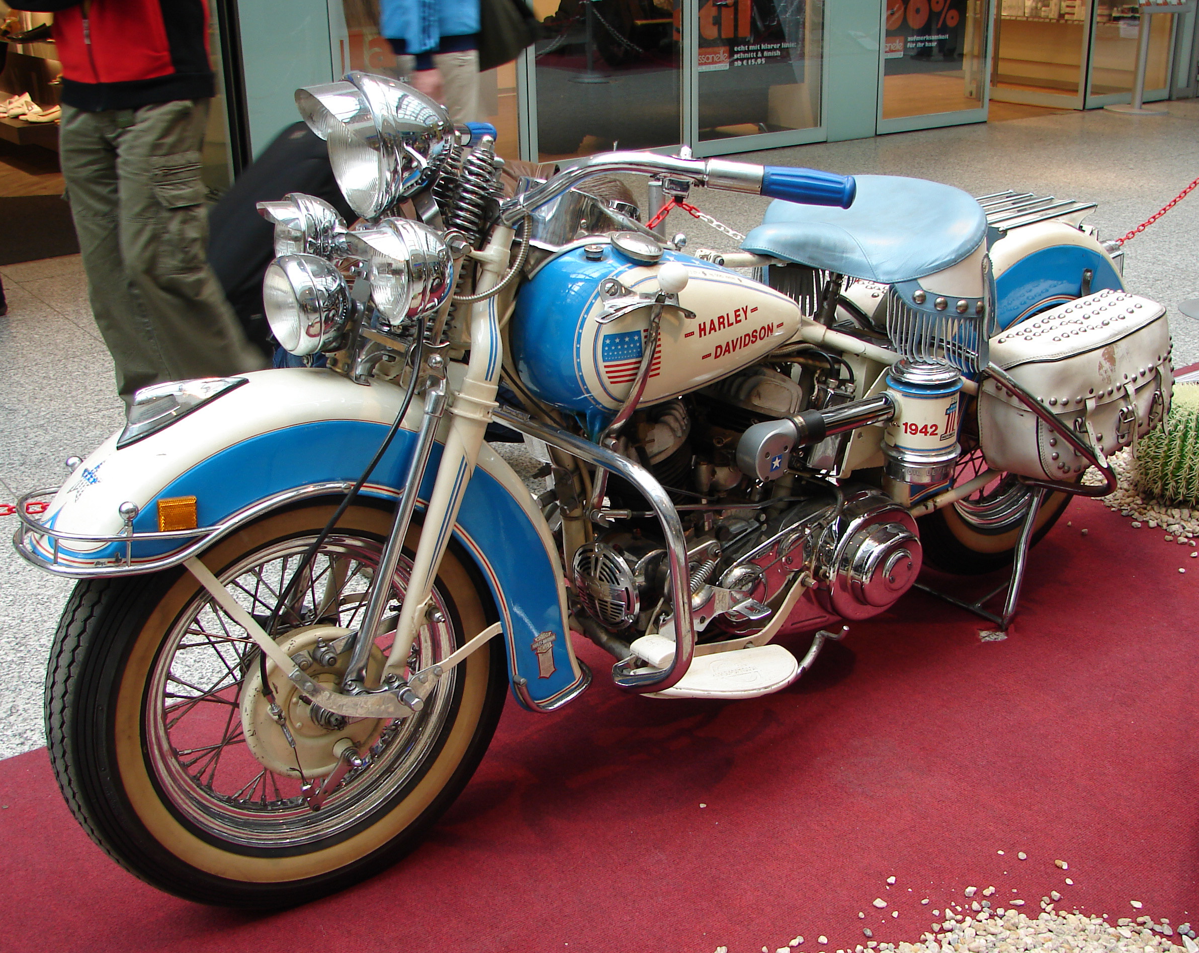 Harley Davidson - Harley Davidson Ausstellung Berlin Ostbahnhof WLC, Baujahr 1942, 24PS, 750ccm